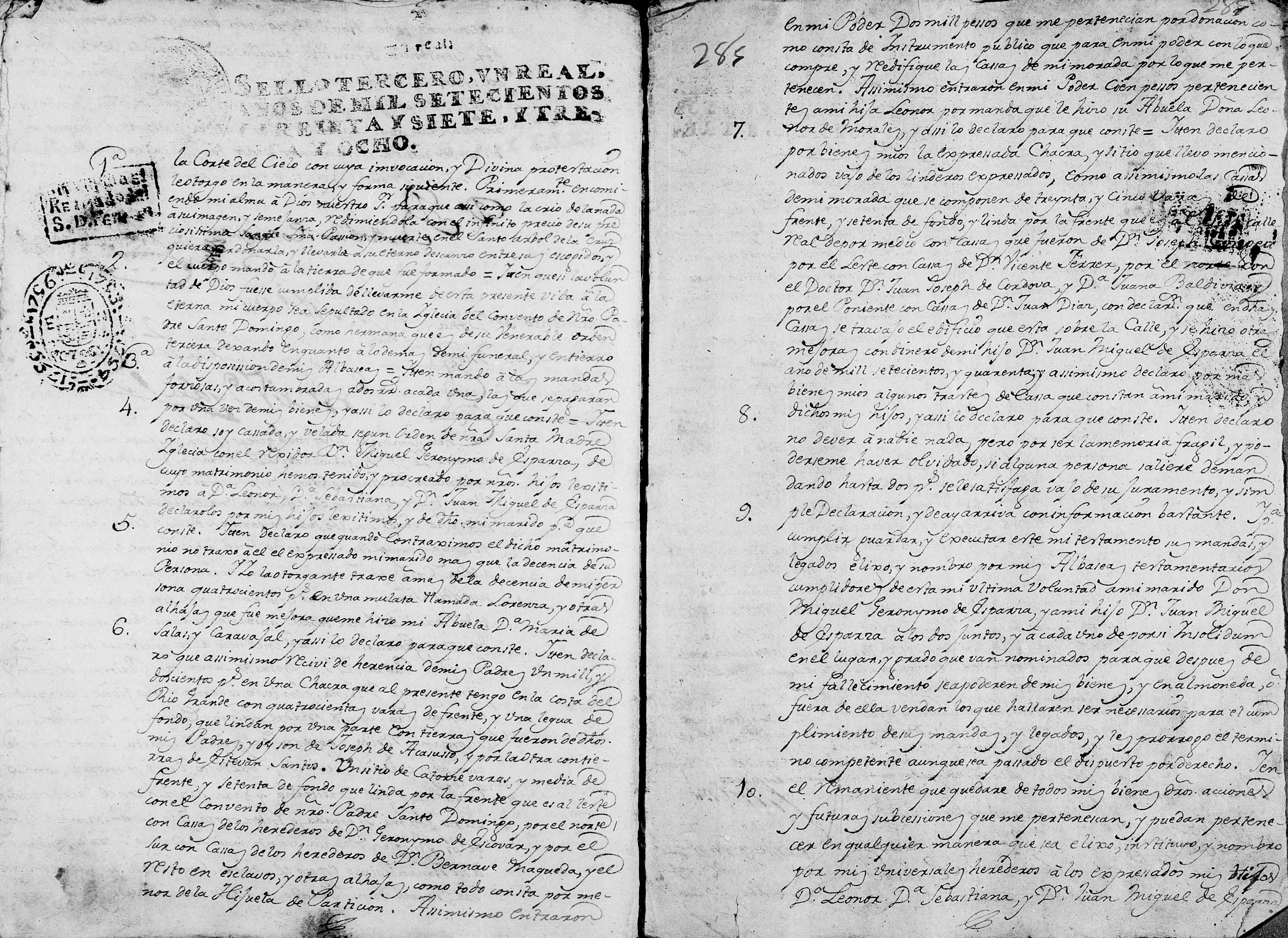 testamento de Antonia Cabral de Melo, esposa de Miguel Gerónimo de Esparza.